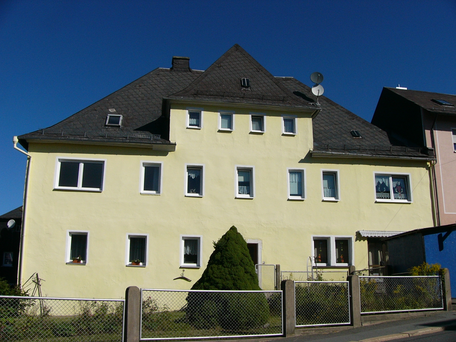 Ortsansicht Selbitz